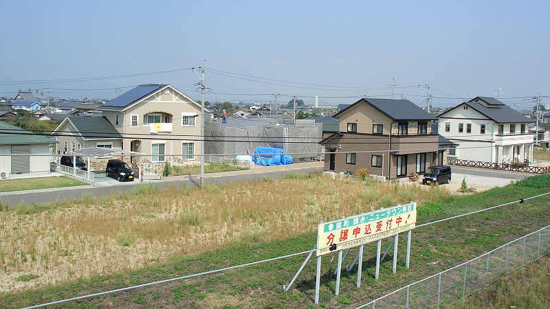 JR鹿児島本線有佐駅 駅裏風景 構内の跨線橋から北方向を見る。 良い写真があれば差し替えてください。 撮影者/著者/著作権保有者 : MK Products (本人がアップロード) 撮影日 : 2007/10/05 有佐駅用にアップロードした画像です。良い画像があれば別の画像に変えてください。